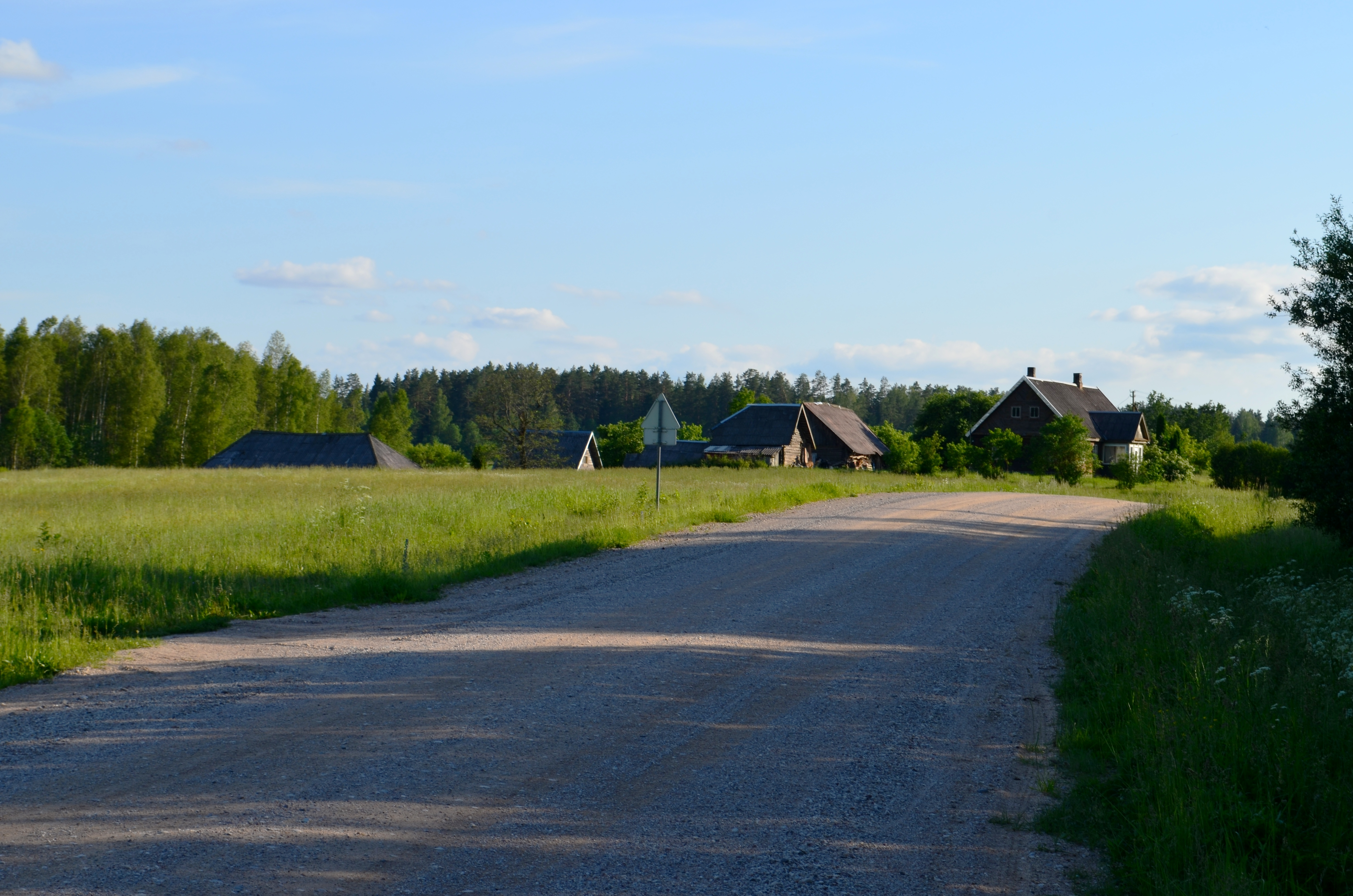 Drobiškės, Zarasų r.